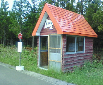 下北交通 バス待合所ブース（「名子平」バス停：むつ市関根）